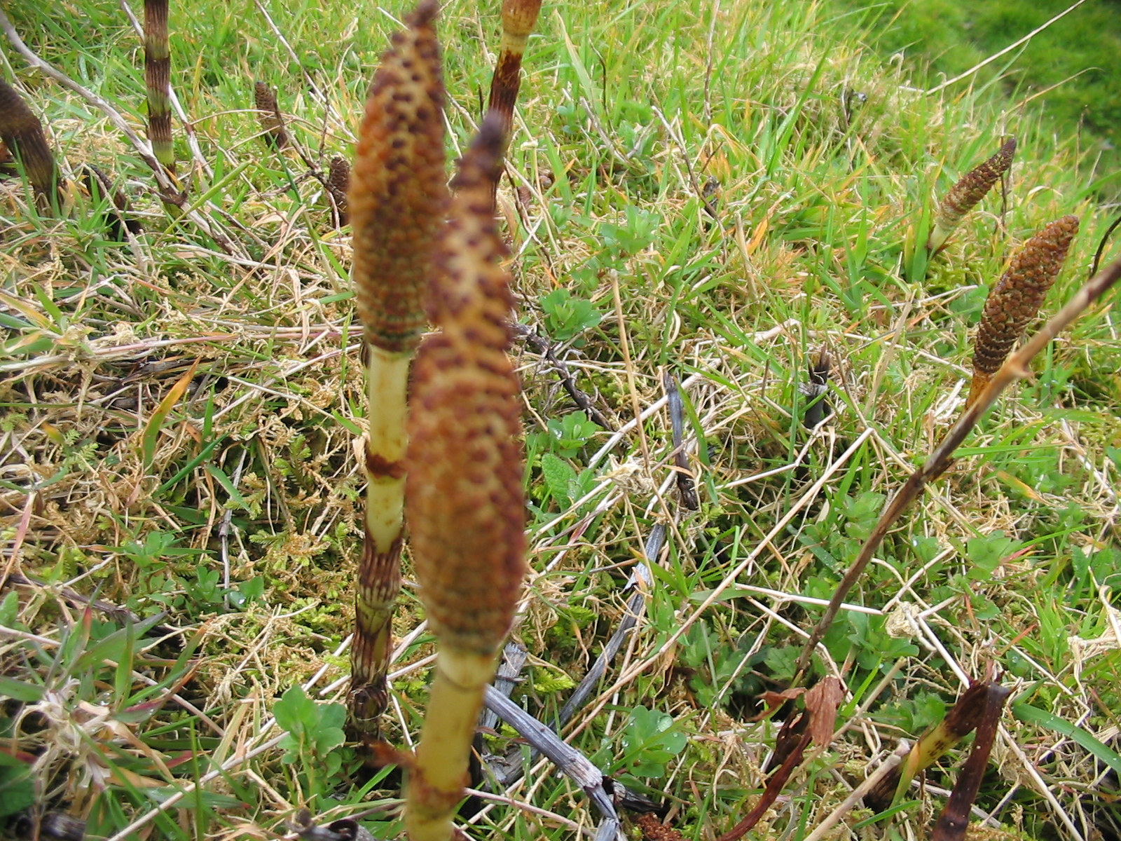 Riesen-Schachtelhalm (Equisetum telmateia) - Spores